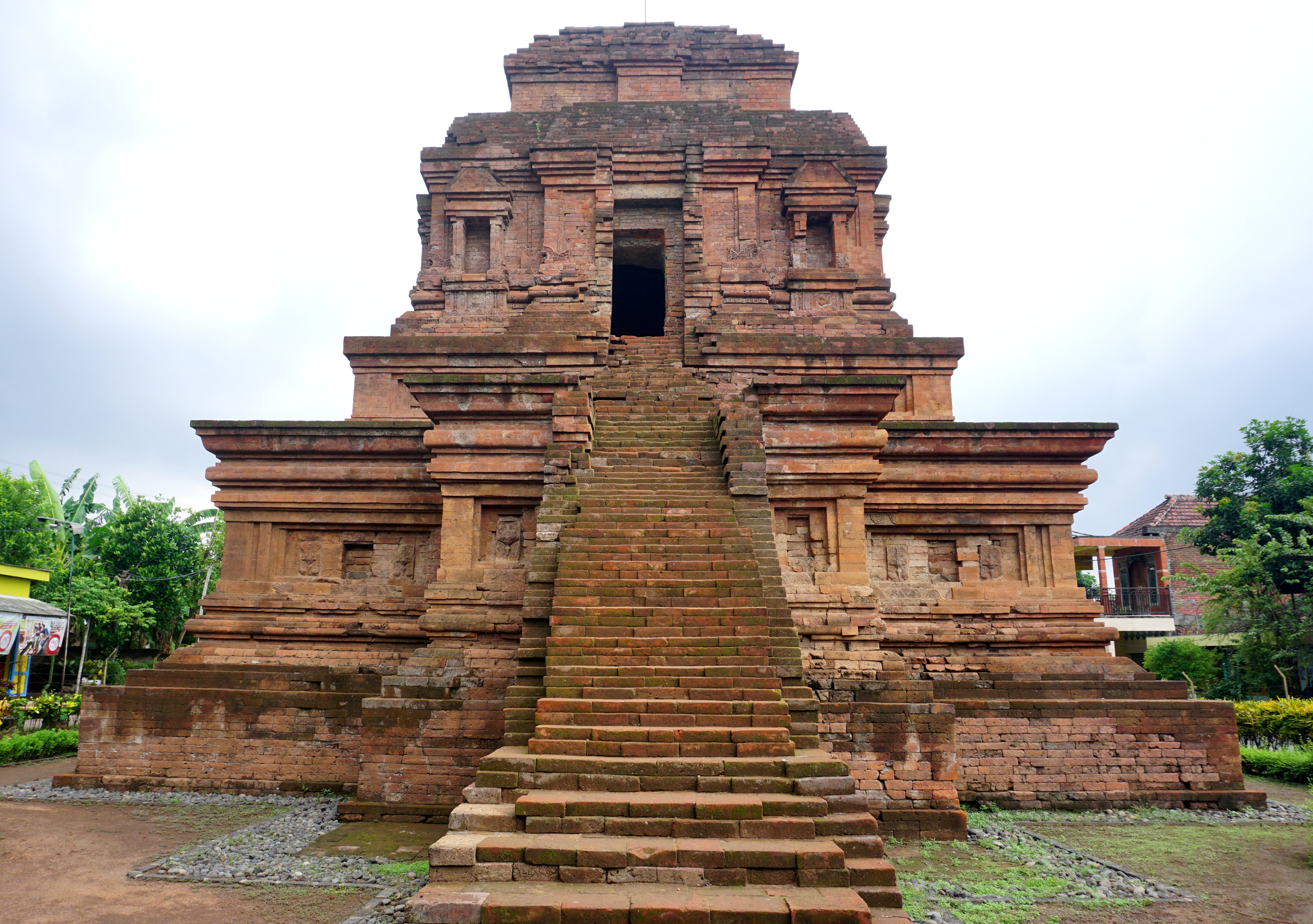 035 Main Entrance, Gunung Gangsir, Pasuruan Candis, East Java Pasuruan, East Java